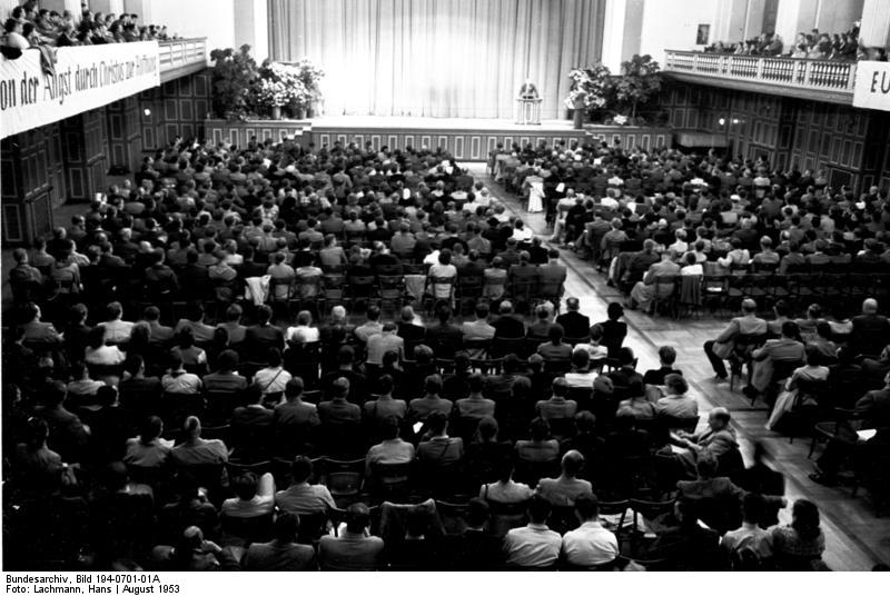 CVJM in Kassel